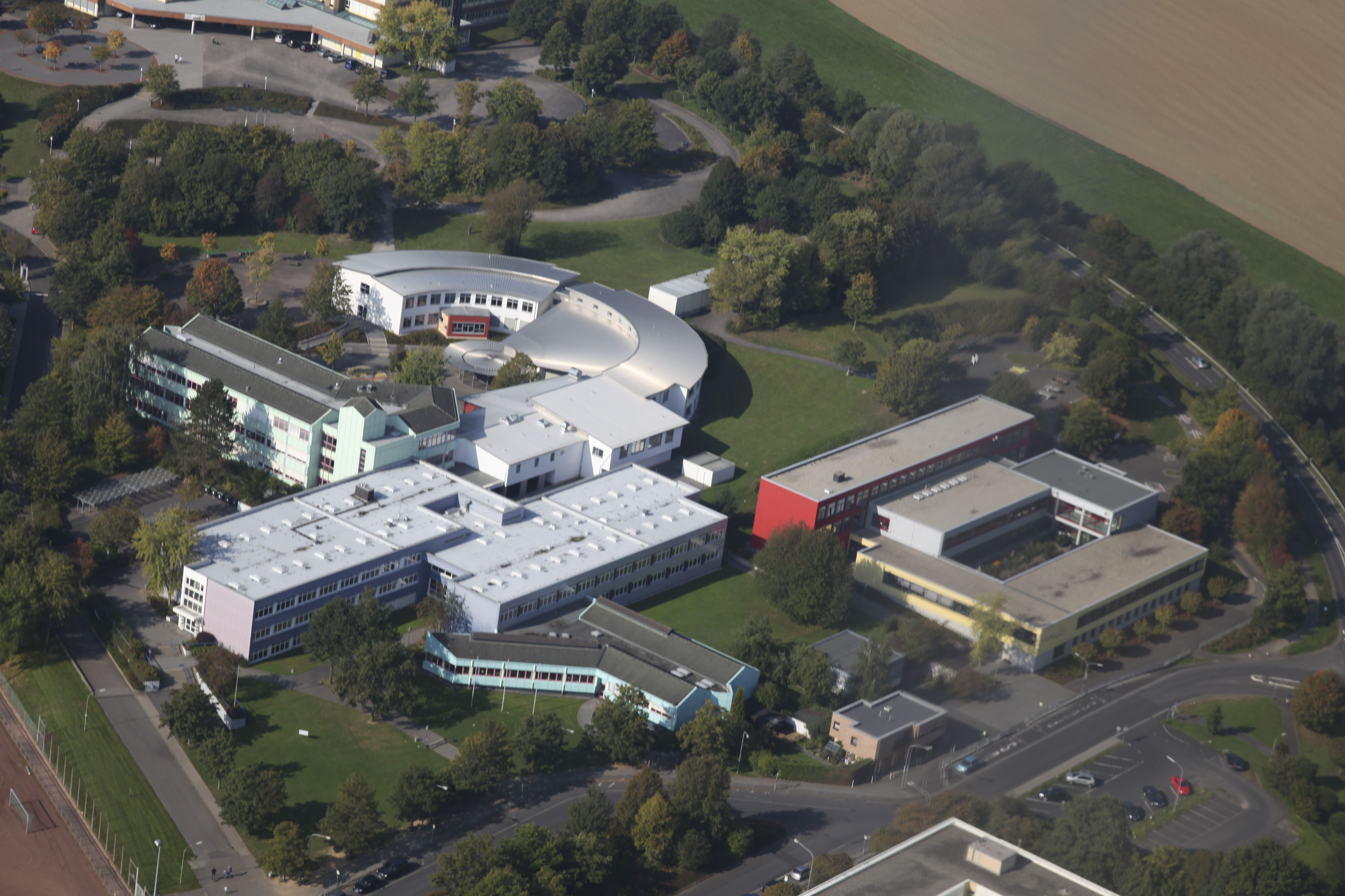 Luftaufnahme des Mons-Tabor-Gymnasiums aus dem Flugzeug von Familie Eggenberger